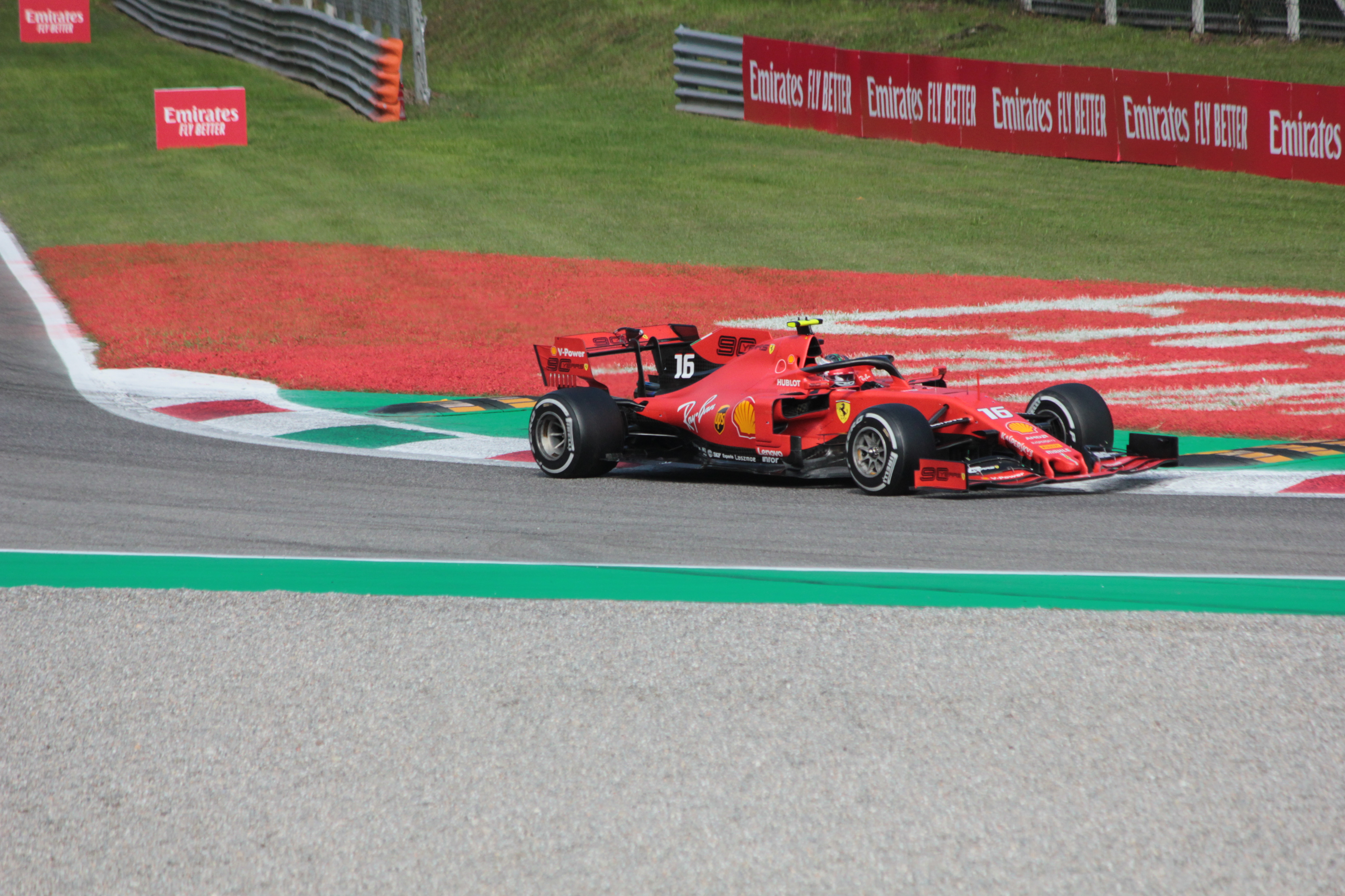 Charles Leclerc alla Variante Ascari durante il Gran Premio d'Italia 2019